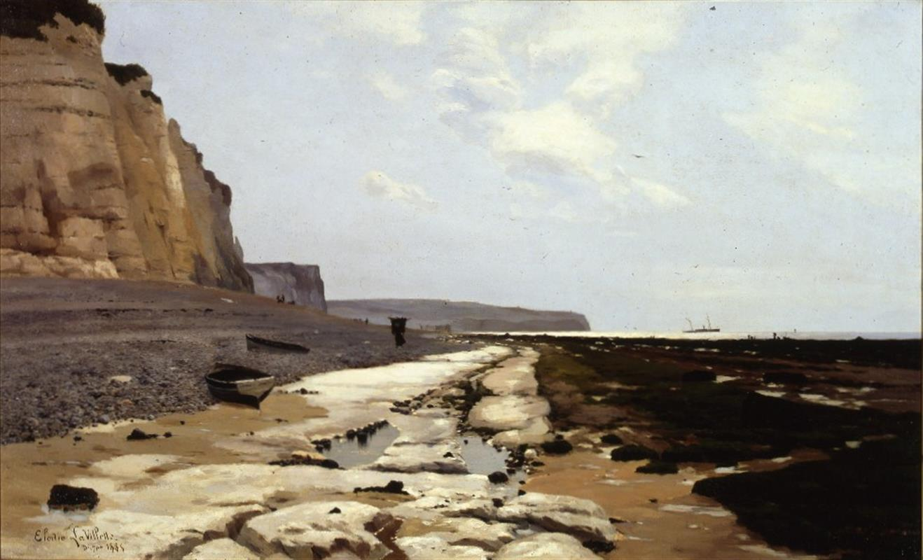 Elodie La Villette, Chemin de Bas Fort Blanc, 1885, Huile sur toile, Musée de Morlaix